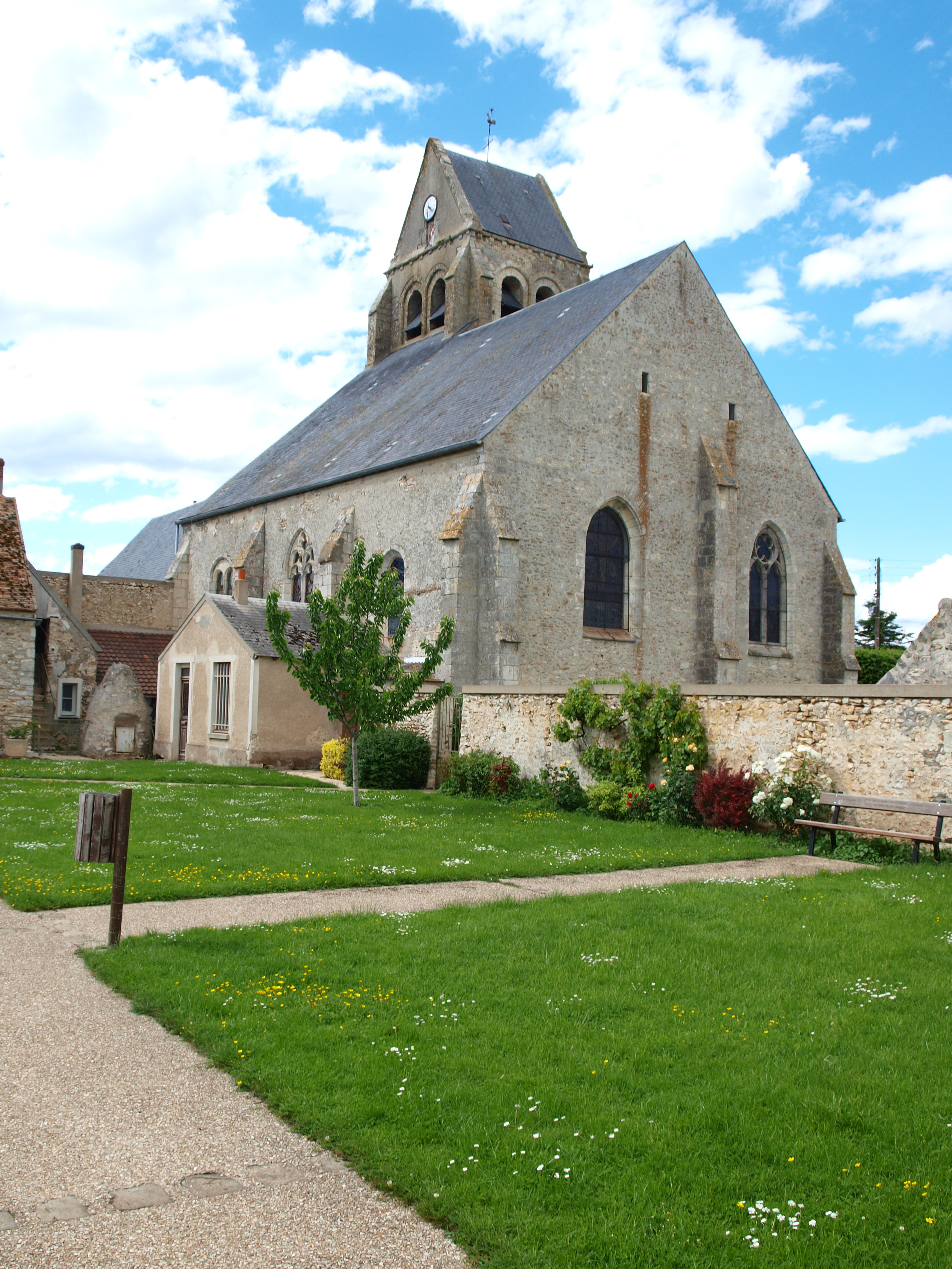 Mérobert